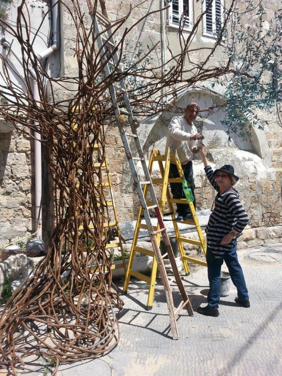 רות הורת וניהאד דביט